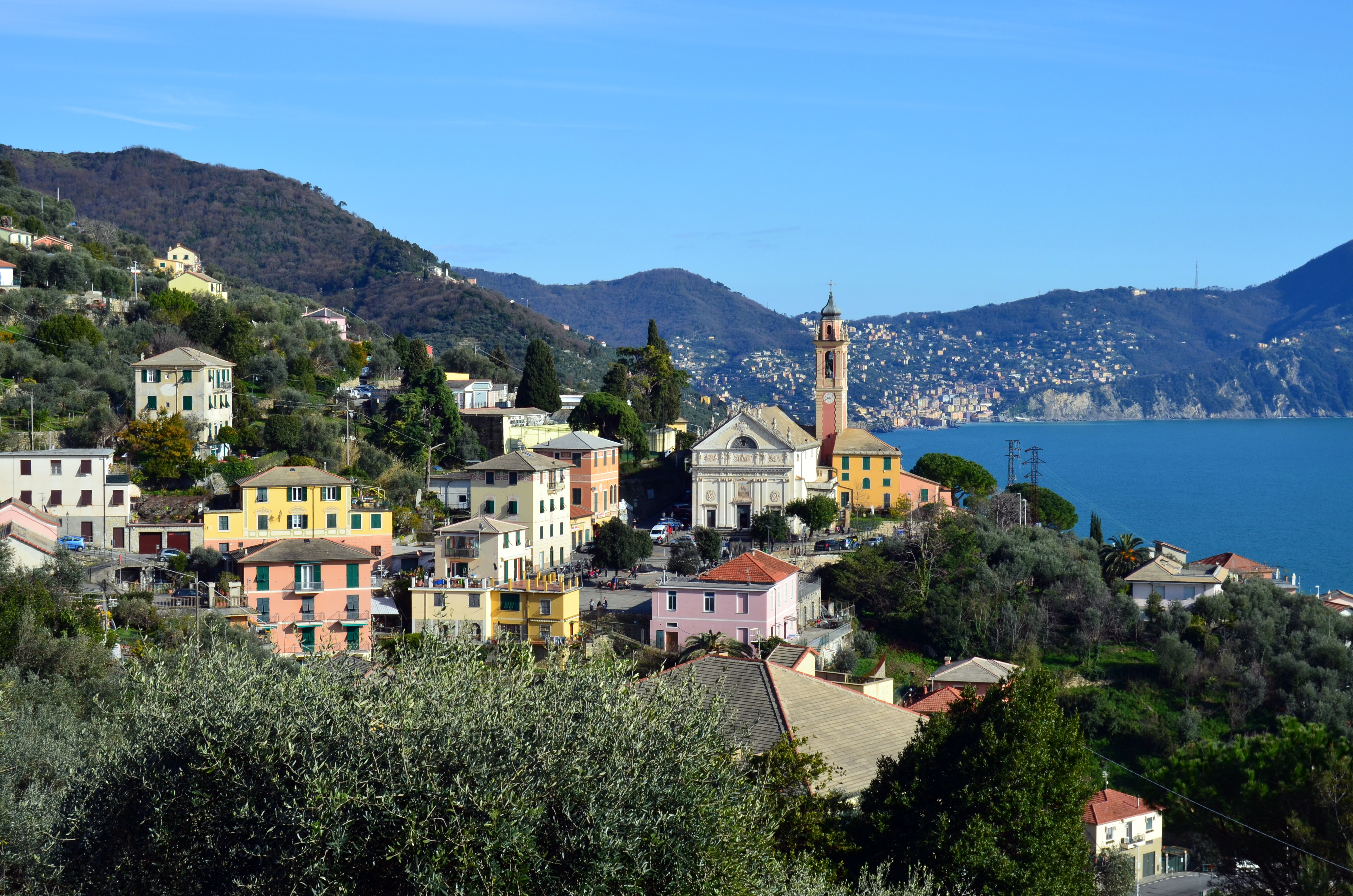 Panorama di Pieve Alta nel comune di Pieve Ligure, Liguria, Italia